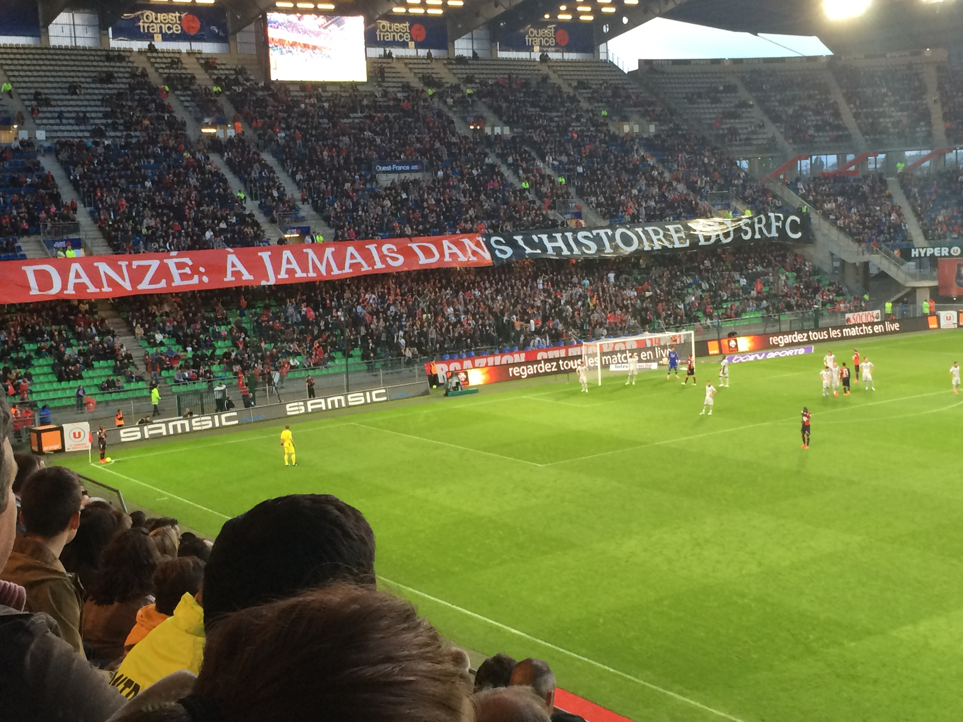 Tifo déployé par le Roazhon Celtic Kop pour le 300ème match de Romain Danzé avec le Stade rennais.